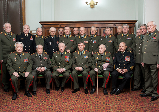 Члены Управление генеральных инспекторов МО РФ с начальником Генерального штаба ВС РФ — 1-м заместителем Министра обороны РФ В.В. Герасимовым